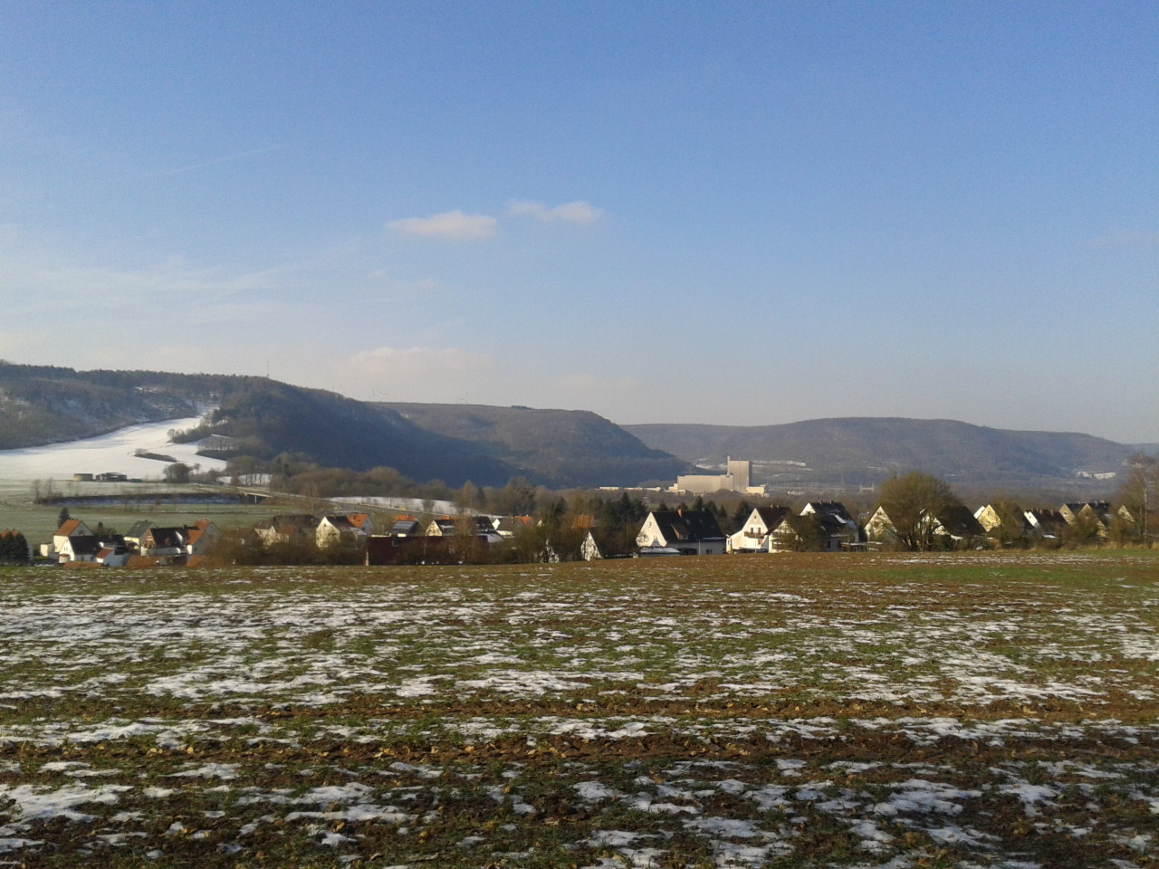 Blick auf Herstelle (Standpunkt oberhalb der Carolus-Magnus-Straße) auf die Häuser der Benediktstraße u.a. in Herstelle. Im Hintergrund das Weserbergland mit dem Mühlenberg, unter dem sich die Weserschleife am ehemaligen KKW Würgassen befindet, dessen noch bestehende Gebäudeteile immer noch unübersehbar die Landschaft dominieren.